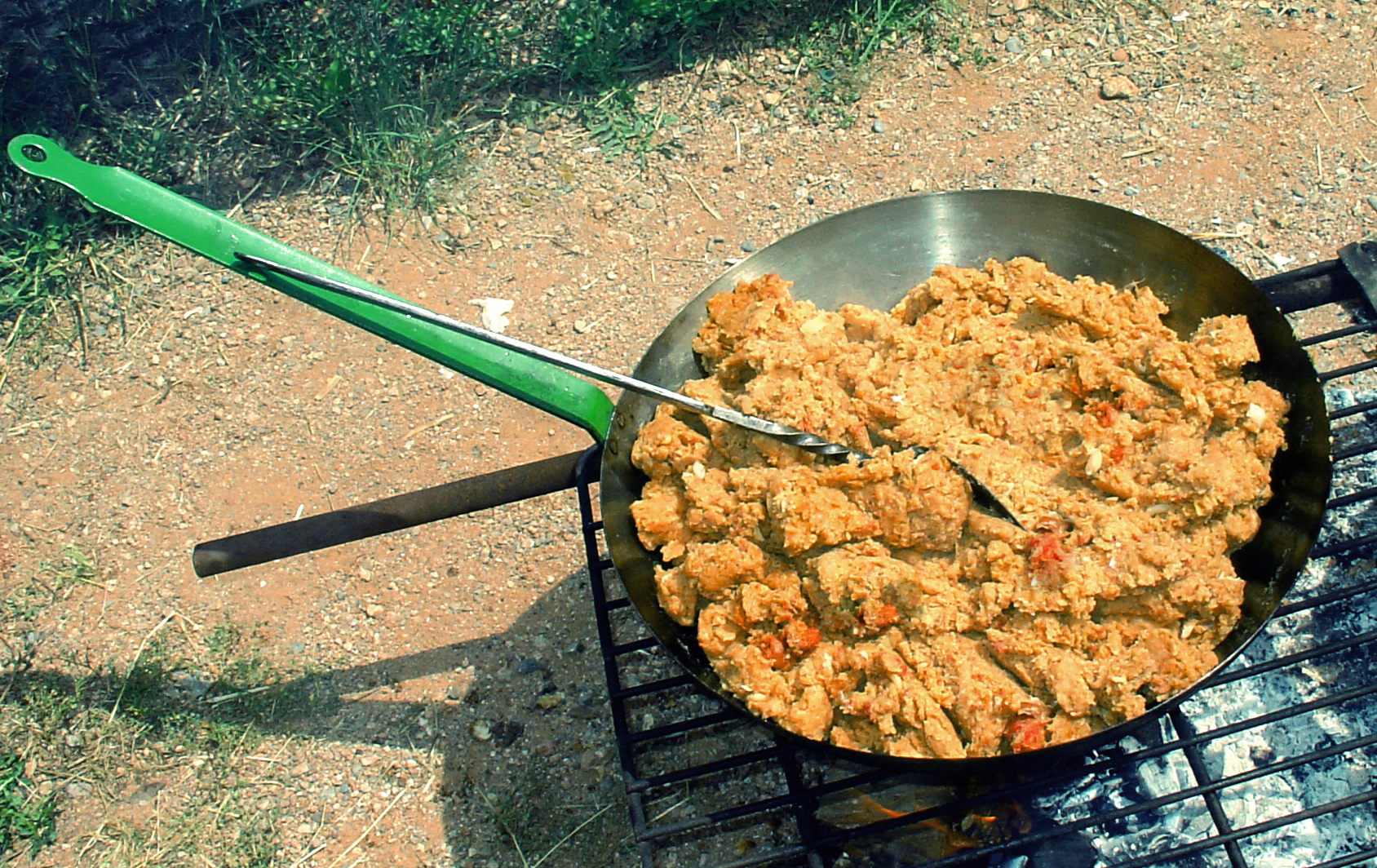 Cooking Migas